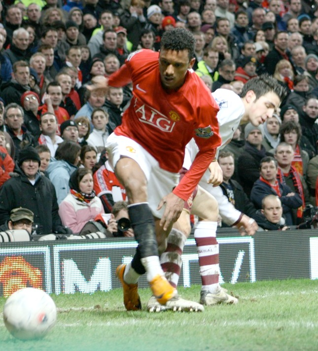 Manchester Uniteds Nani i kamp med Arsenals Cesc Fàbregas